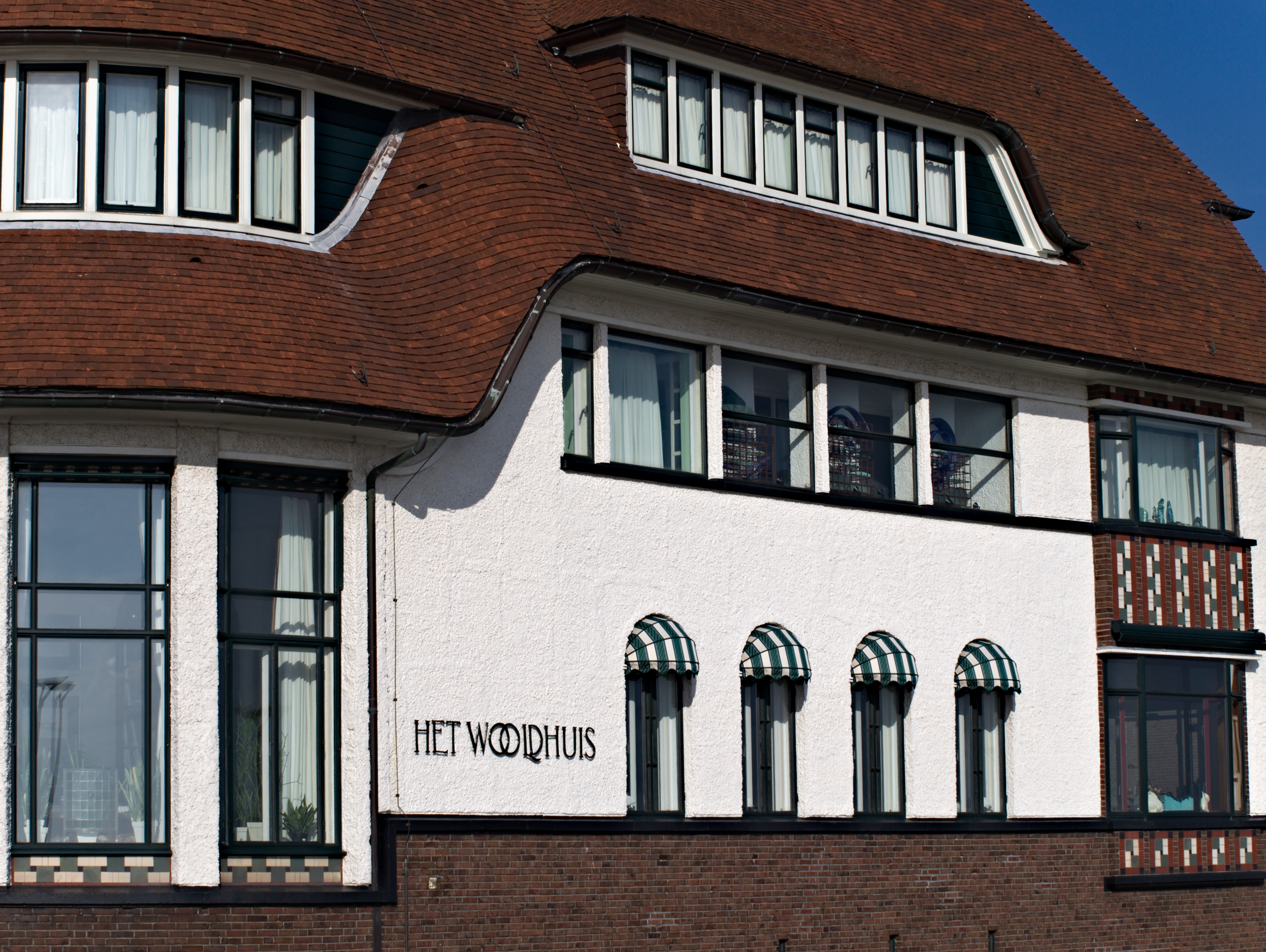 Rijksmonumenten Monument het Wooldhuis aan Boulevard Evertsen 290 te Vlissingen.